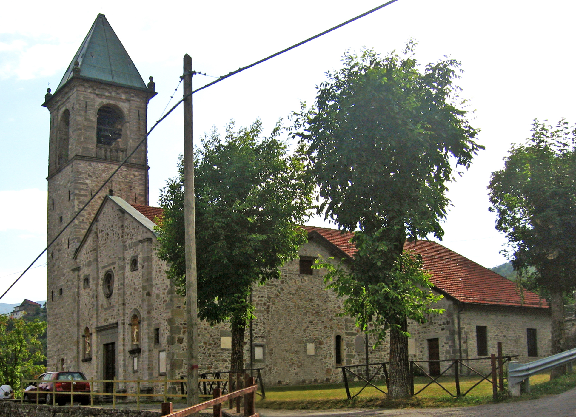 Chiesa dei Santi Lorenzo e Michele (Monchio delle Corti) - esterno